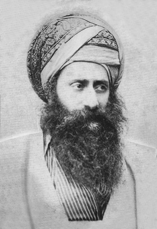 הרב יוסף חיים מבגדאד, ה"בן איש חי"